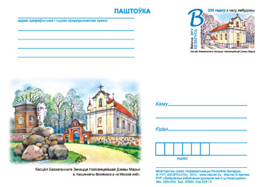 Паштовая картка з арыгінальнай маркай